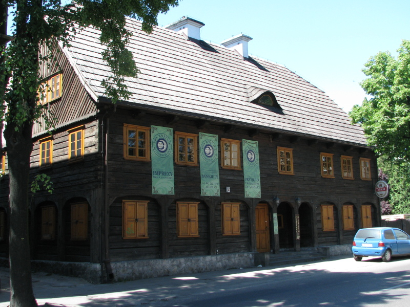 Pabianice, ul. św. Jana 20 - Dom Tkacza (zabytek nr rejestr. A/47 z 29.08.1967 oraz 66-IV-14 z 12.10.1946)